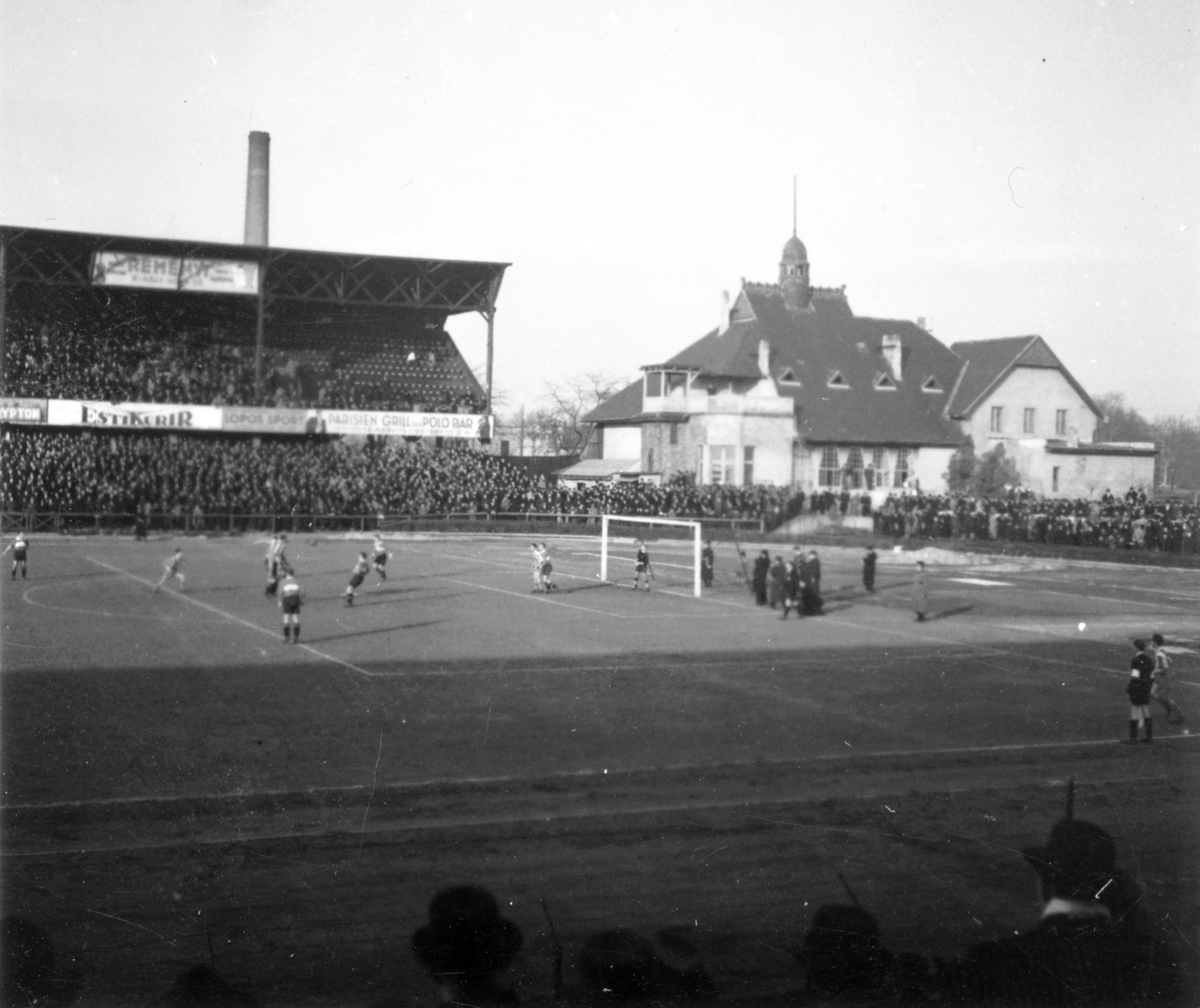 Üllői út, FTC pálya, a B tribün mellett a klubház épülete. Location: Hungary, Budapest IX. Tags: ad, soccer field, Budapest Title: Üllői út, FTC pálya, a B tribün mellett a klubház épülete.